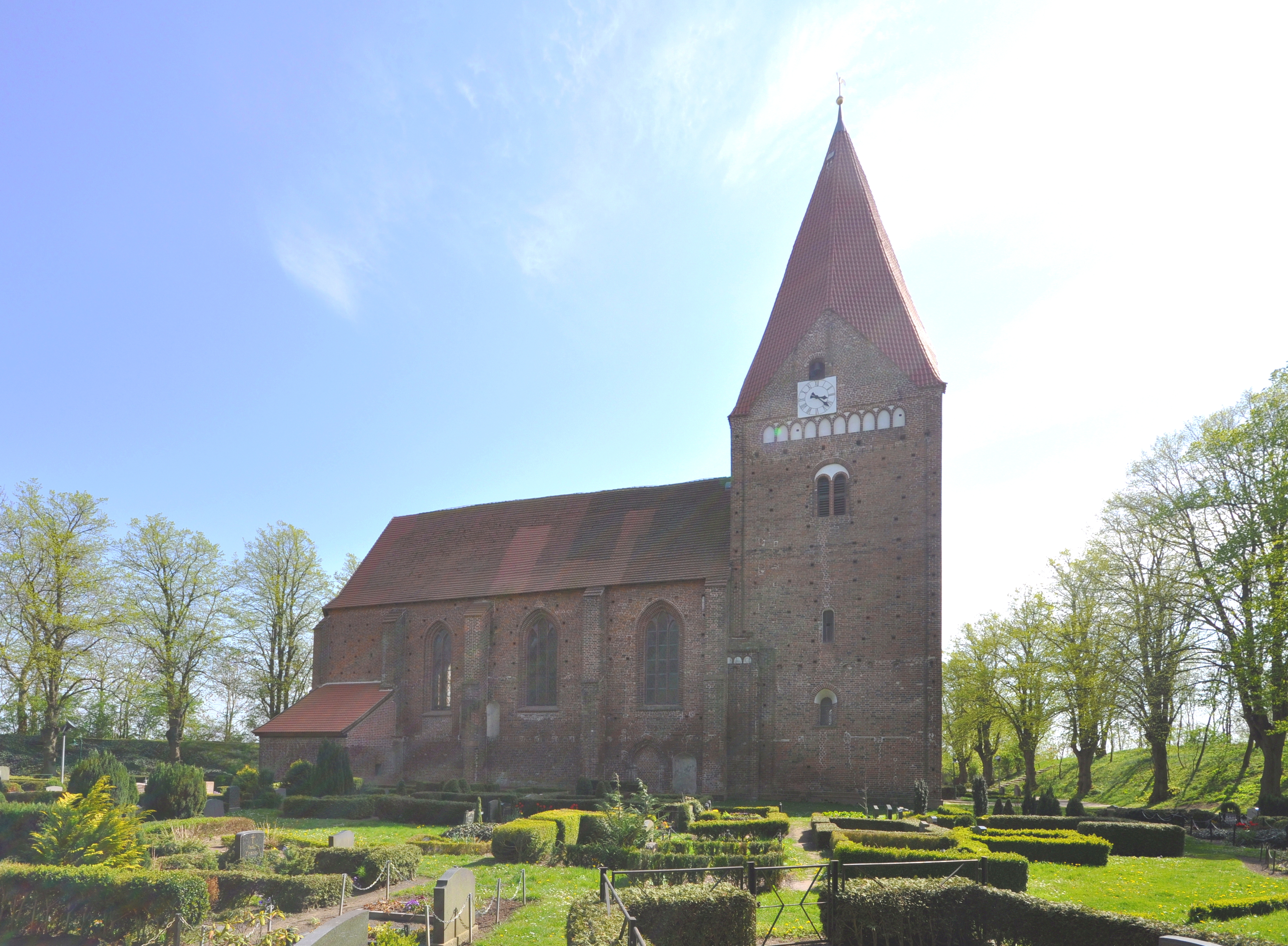 Church in Kirchdorf